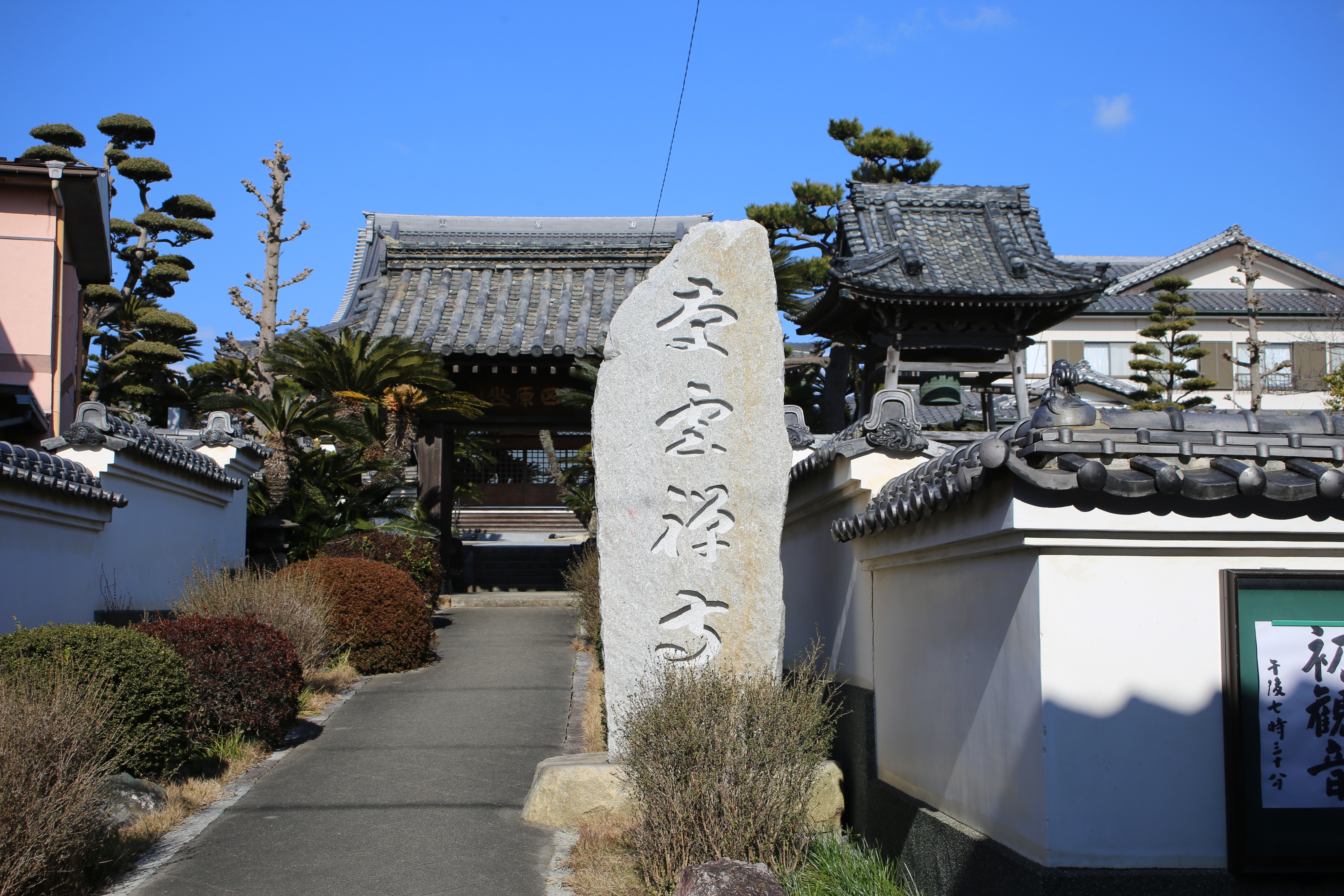 愛知県田原市田原町の慶雲寺